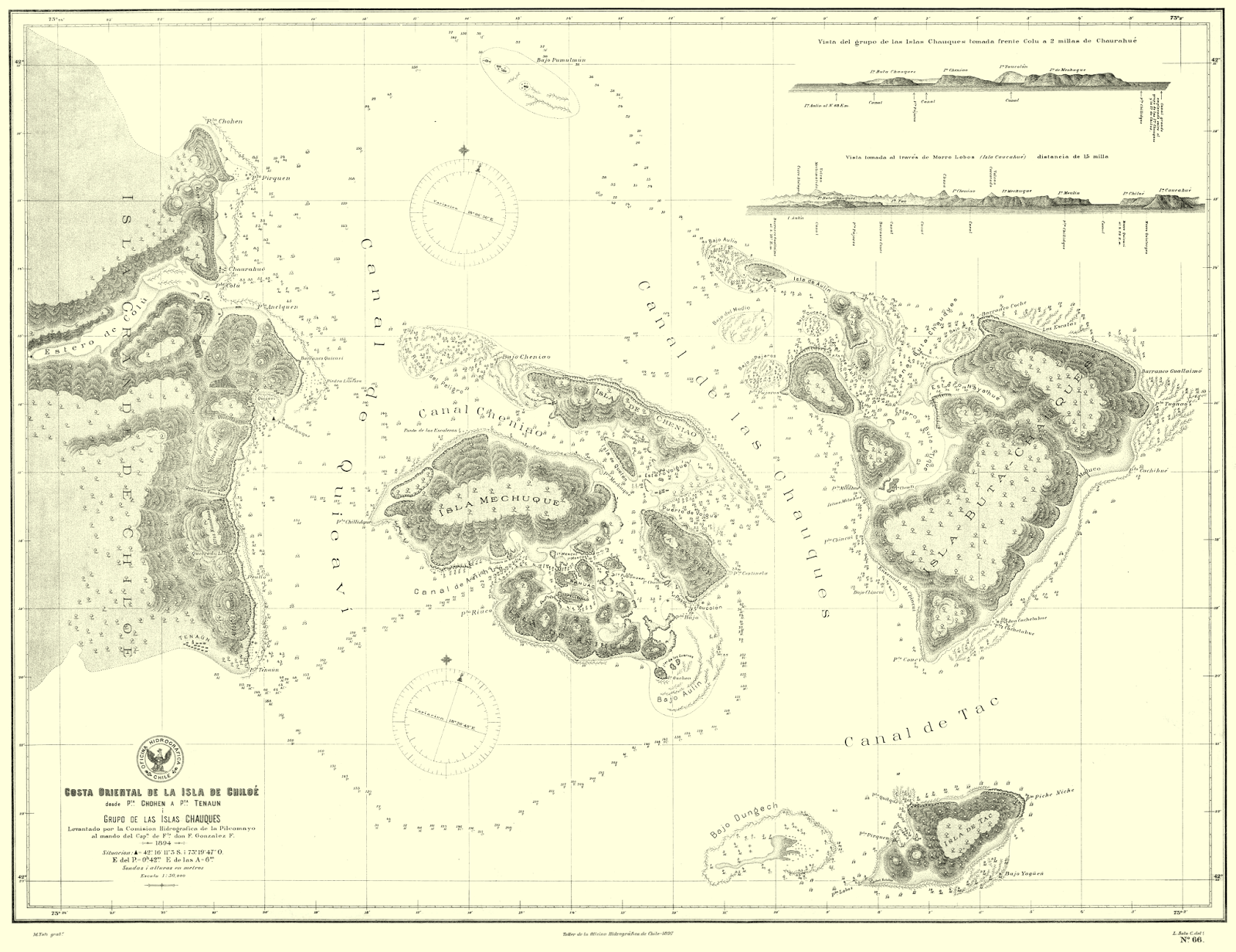 Plano N° 66 de la Oficina Hidrográfica que muestra la costa oriental de la isla de Chiloé desde punta Chohen a punta Tenaun, y Grupo de las islas Chauques, levantado por la comisión hidrográfica de la cañonera “Pilcomayo” al mando del capitán de fragata Froilán Gonzales en 1894, y publicado en los talleres de la oficina en 1897 (Anuario Hidrográfico 1898, entre páginas 118 y 119) Anuario Hidrográfico 1898. 97..png